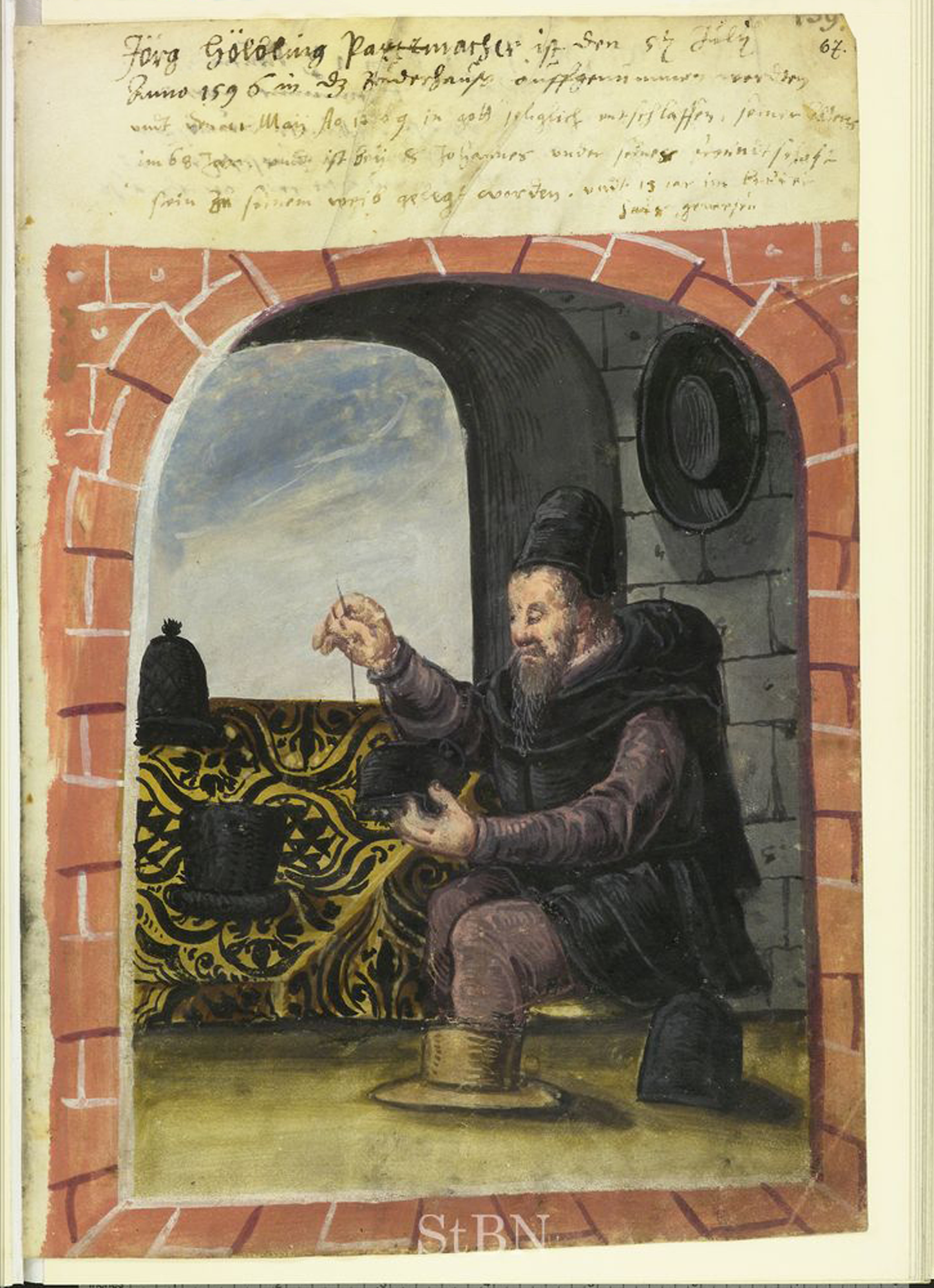 Jörg (Georg) Hölbling, Parettmacher (Barett-, Hutmacher)